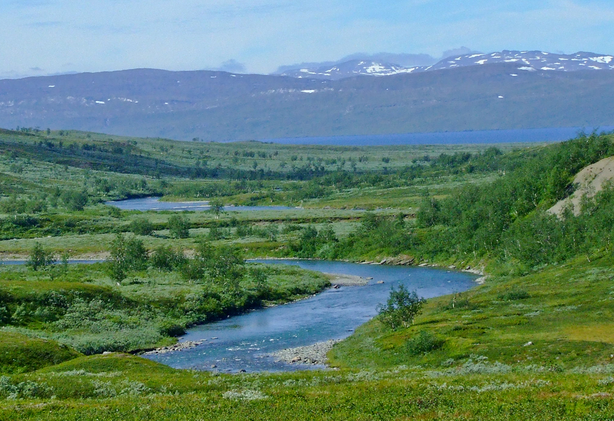 Unterlauf des Låddejåkkå zum Vastenjaure